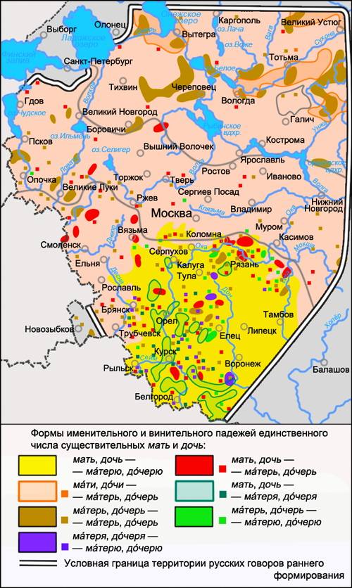 Карта распространения диалектного явления русского языка в области морфологии: соотношение форм именительного и винительного падежей единственного числа существительных мать и дочь: мать, дочь — мáтерю, дóчерю, мáти, дóчи — мáтерь, дóчерь, мáтерь, дóчерь — мáтерь, дóчерь и т. д. Источник: Захарова К. Ф., Орлова В. Г., Сологуб А. И., Строганова Т. Ю. Образование севернорусского наречия и среднерусских говоров / Ответственный редактор В. Г. Орлова. — М.: «Наука», 1970. — с. 70 (карта 14).